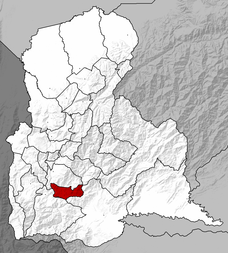 Municipio Torbes - Táchira